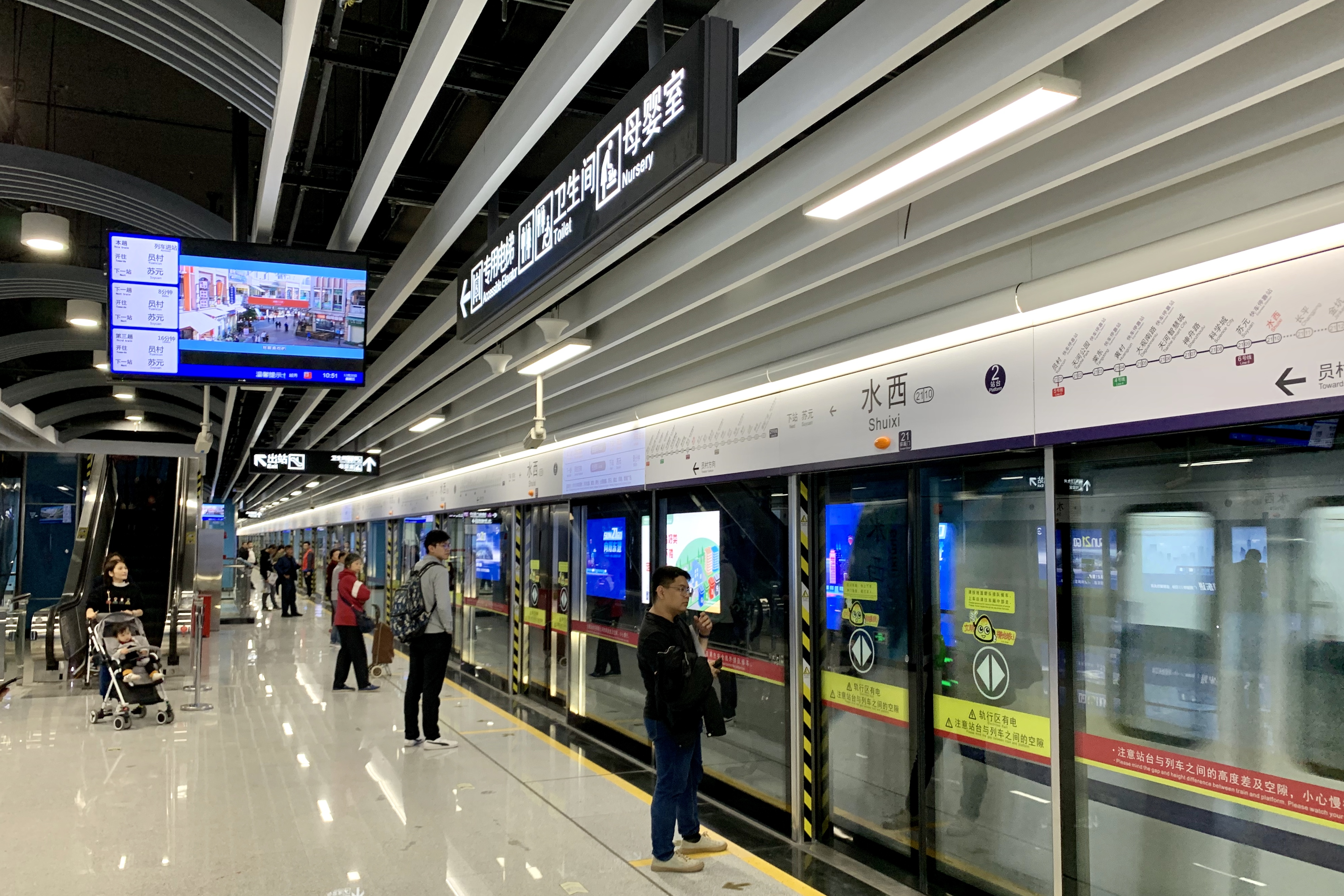 广州地铁水西站2号站台